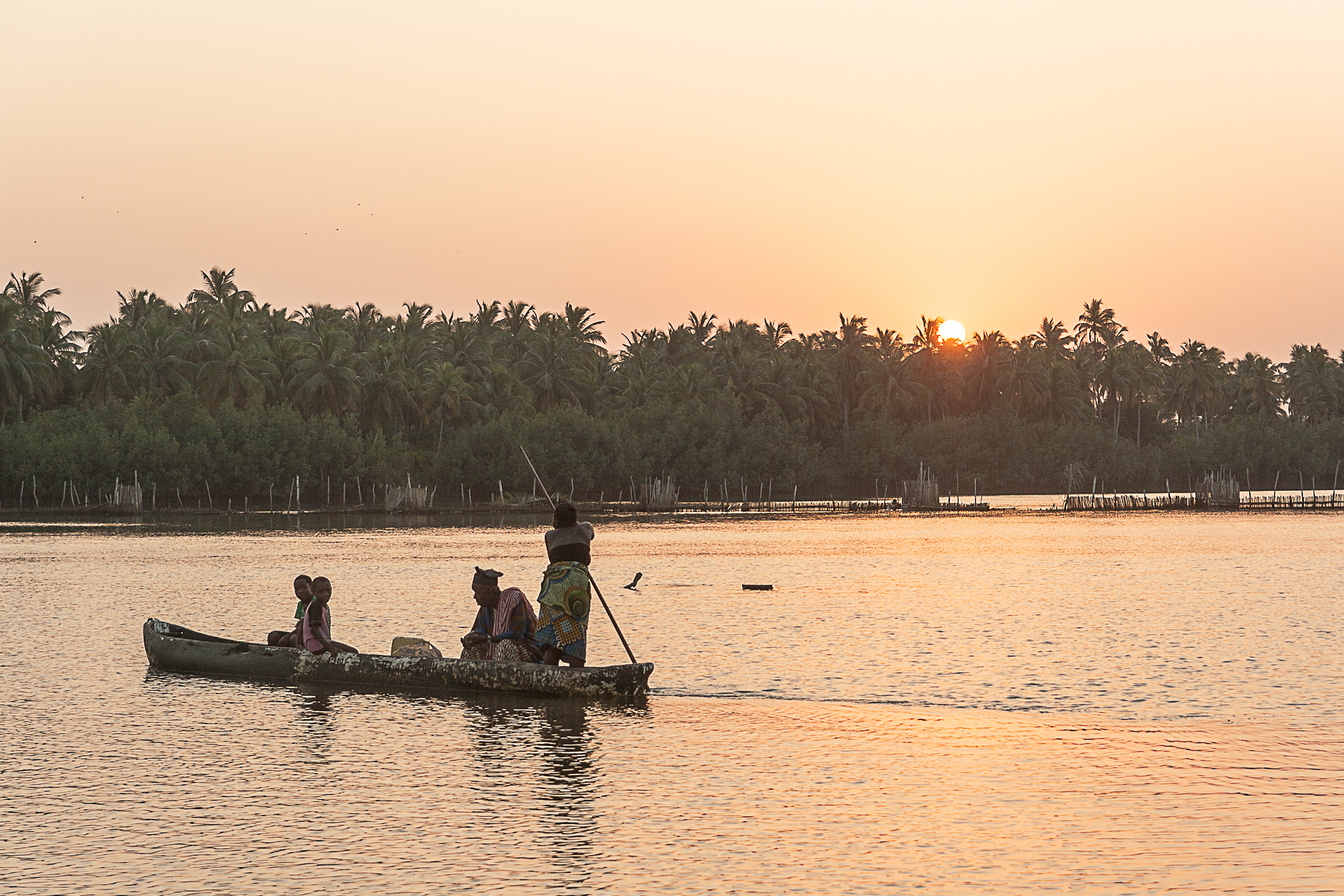 Femme exerçant le métier de traverseuse, Lagune de Djegbaji, Ouidah, Bénin This is an image of "African people at work" from Benin